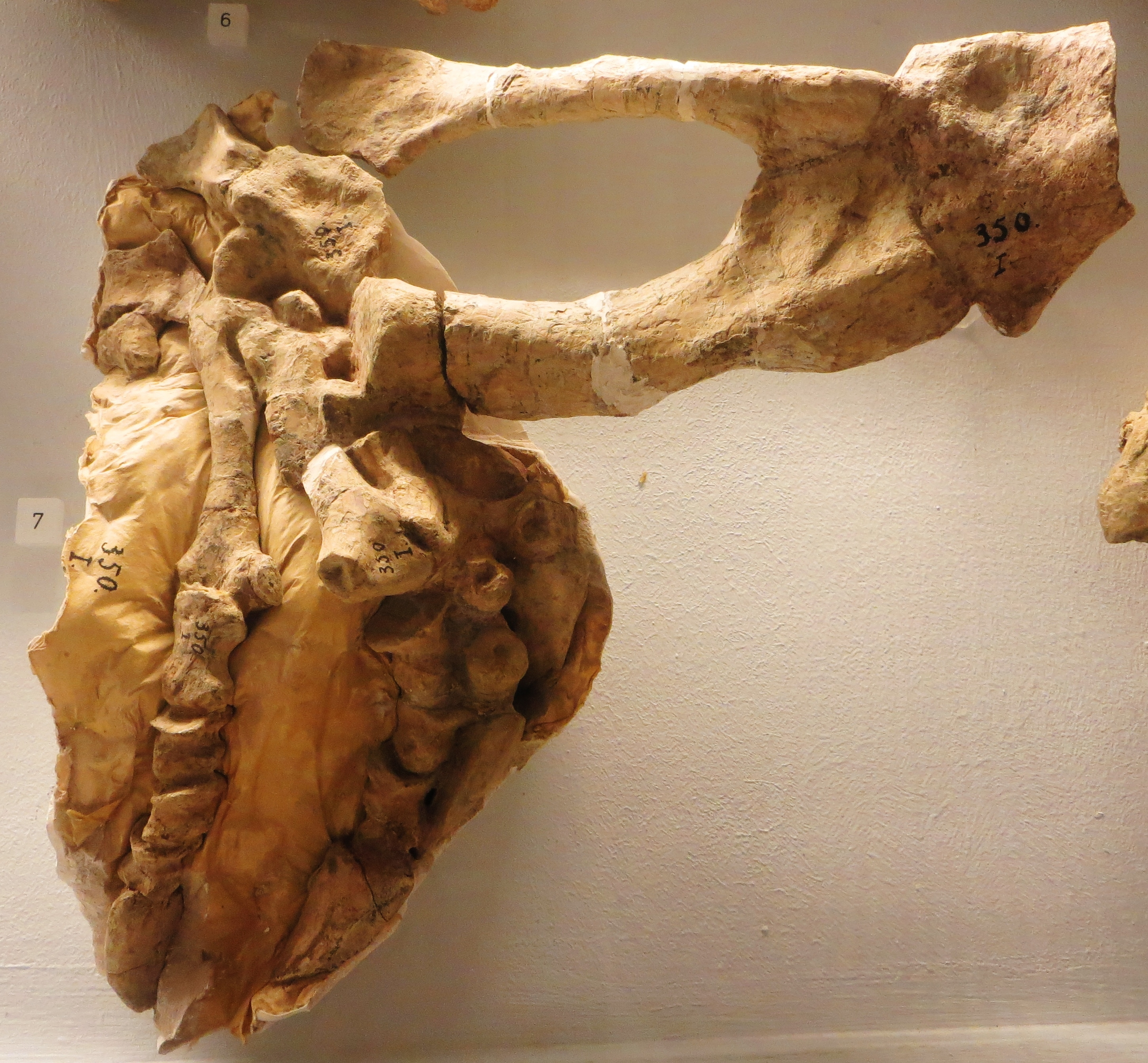 Fossil of Stenaulorhynchus, an extinct reptile - Took the picture at Museum of Paleontology, Tuebingen